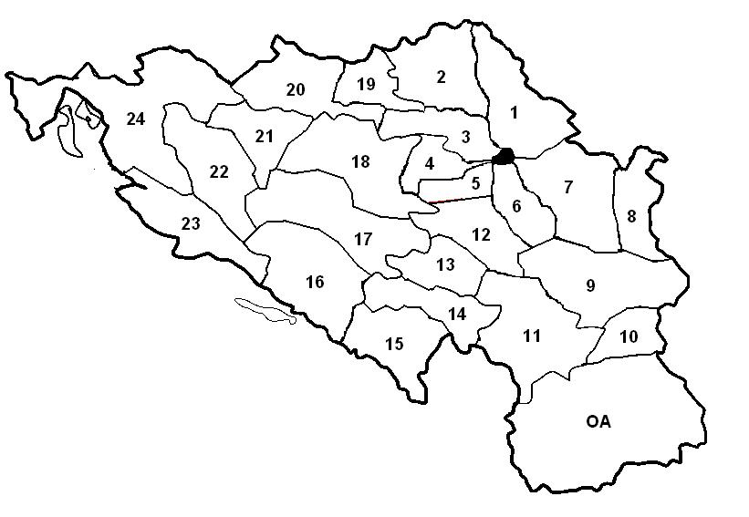 Епархије Српске православне цркве: 1. банатска, 2. бачка, 3. сремска, 4. шабачка, 5. ваљевска, 6. шумадијска, 7. браничевска, 8. тимочка, 9. нишка, 10. врањска, 11. рашко-призренска, 12. жичка, 13. милешевска, 14. будимљанско-никшићка, 15. црногорско-приморска, 16. захумско-херцеговачка, 17. дабробосанска, 18. зворничко-тузланска, 19. осечкопољска и барањска 20. славонска, 21. бањалучка, 22. бихаћко-петровачка, 23. далматинска и 24. горњокарловачка; ОА - православна охридска архиепископија.